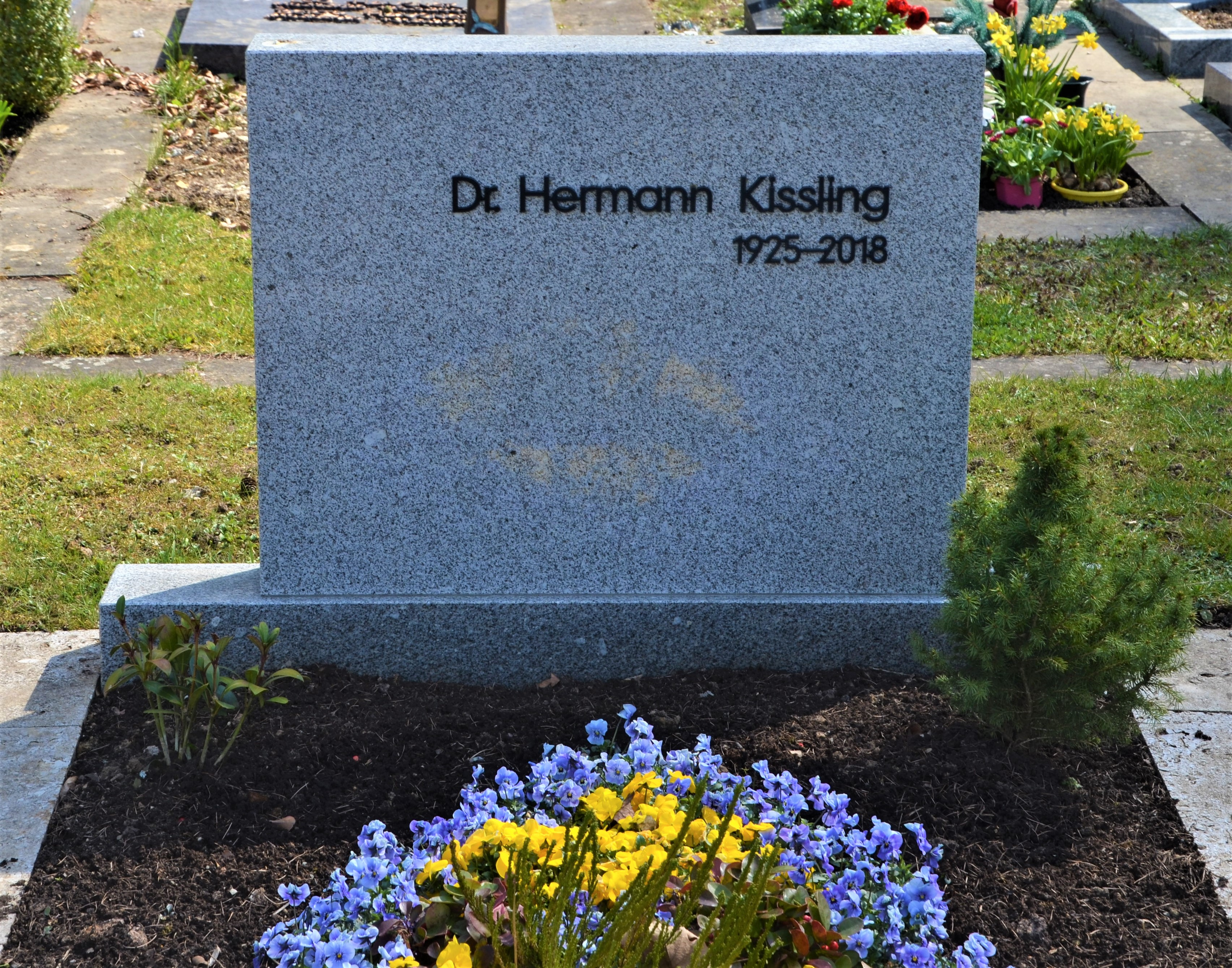 Grabmal von Hermann Kissling, Professor an der PH Schwäbisch Gmünd, Dreifaltigkeitsfriedhof Schwäbisch Gmünd